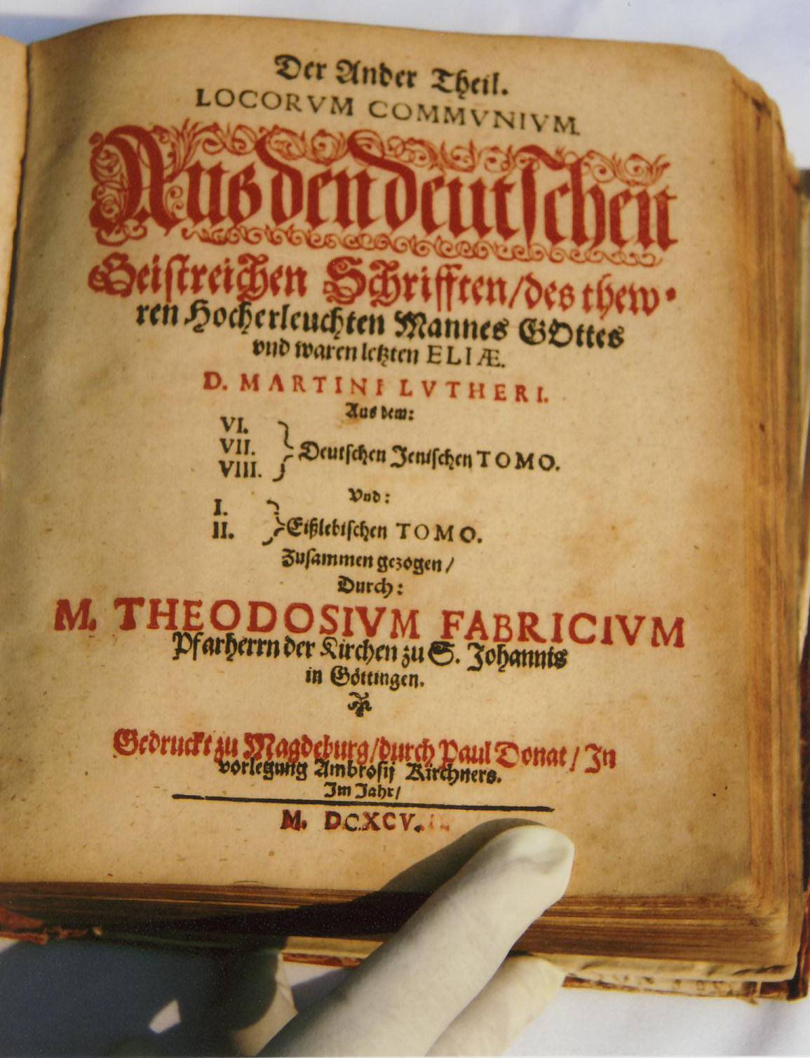 Das Titelblatt des andern Teils vom Loci Communes von Theodosius Fabricius 1597